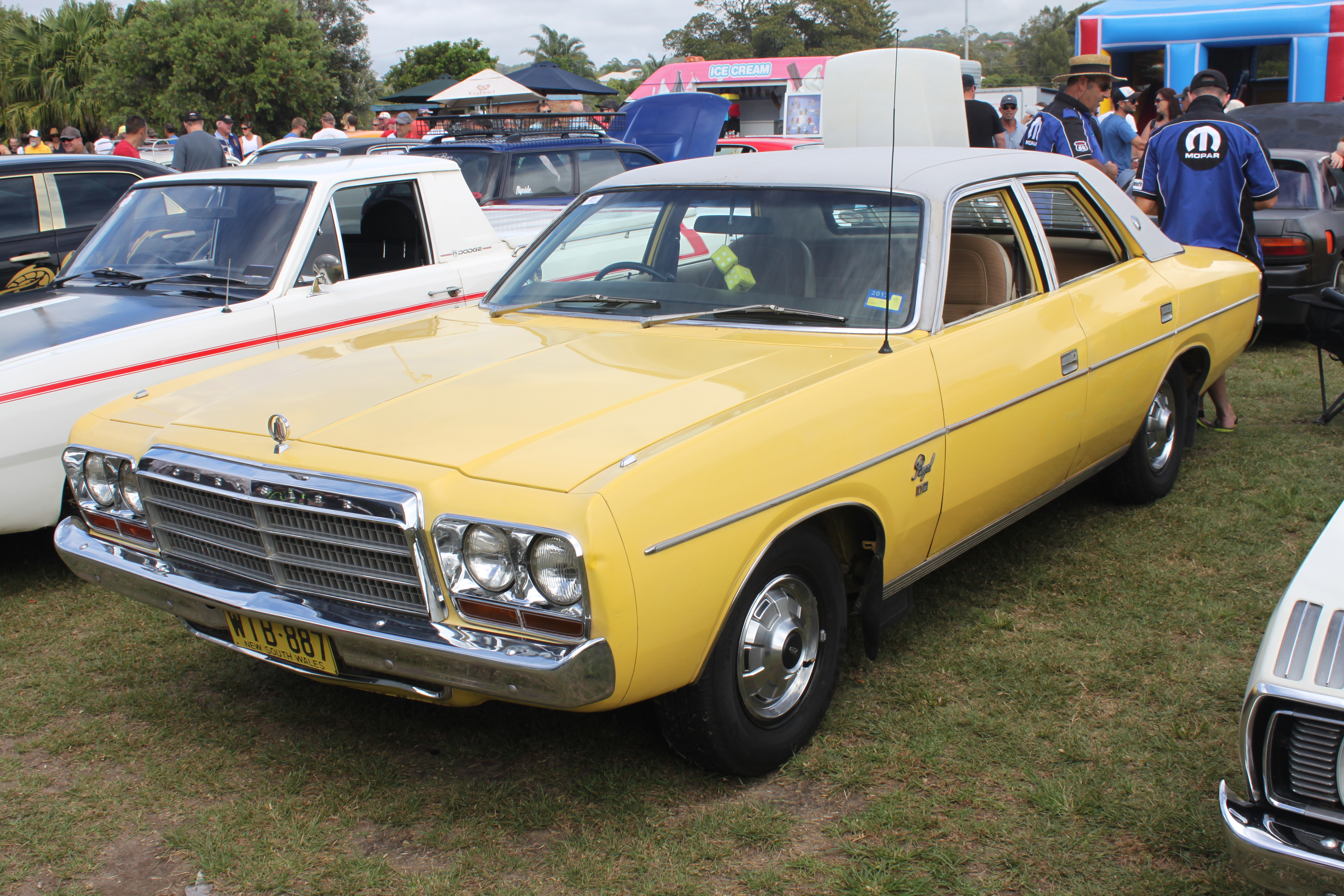 Car & Bike Fest, Pittwater Rugby Park 2015